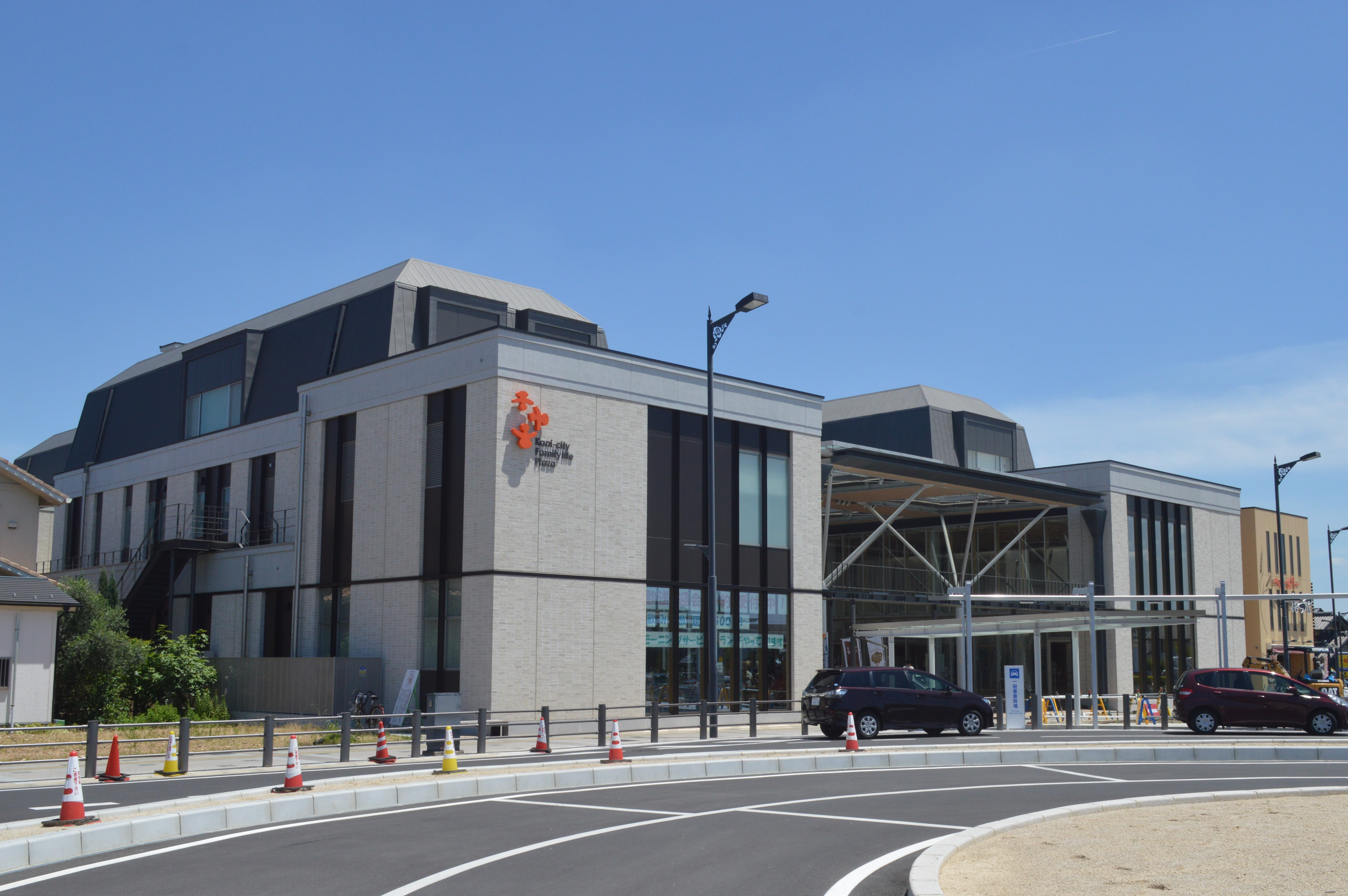 岐阜県可児市にある可児市子育て健康プラザ「マーノ」（mano）。